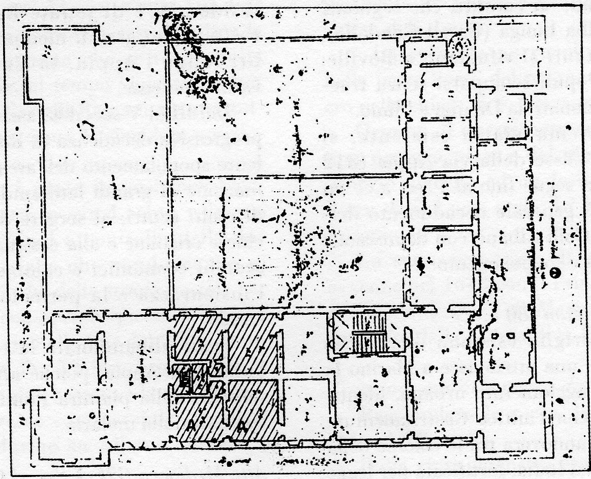 Progetto di Palazzo Colonna a Marino (RM9 di Antonio da Sangallo il Giovane